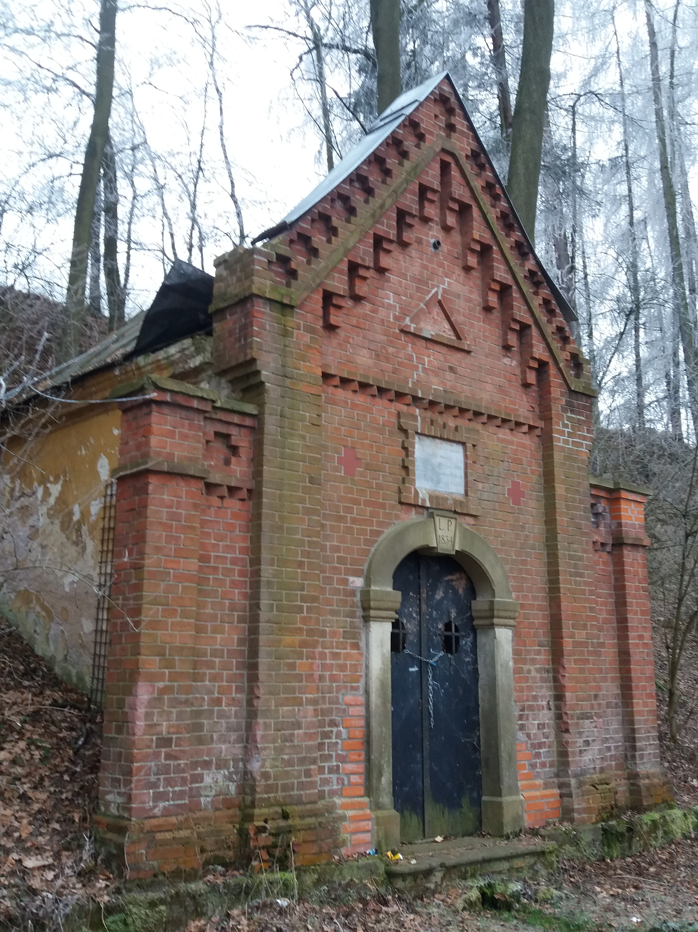 Kaple Nejsvětější Trojice (Jaroměř)